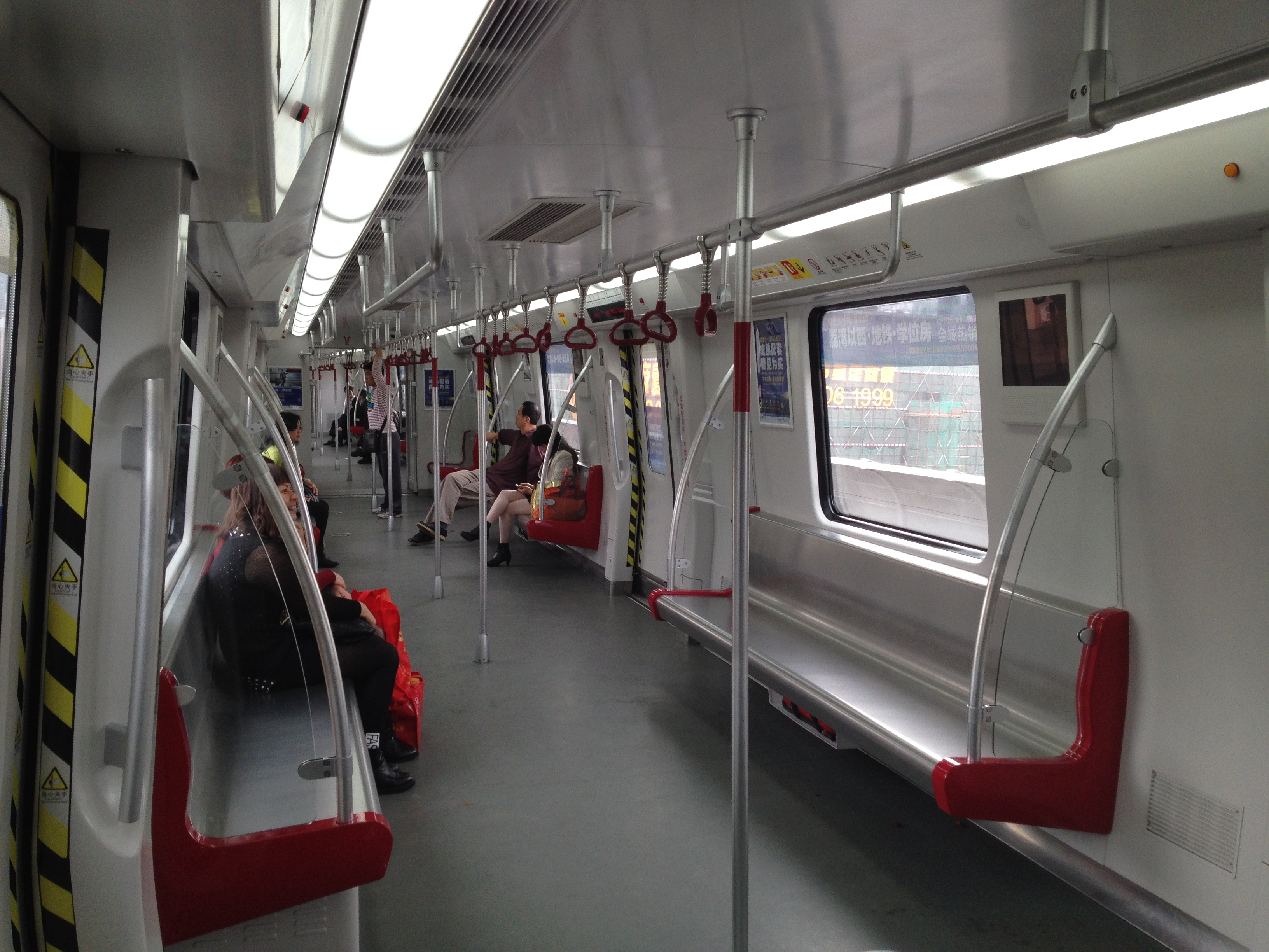 广州地铁6号线列车车厢